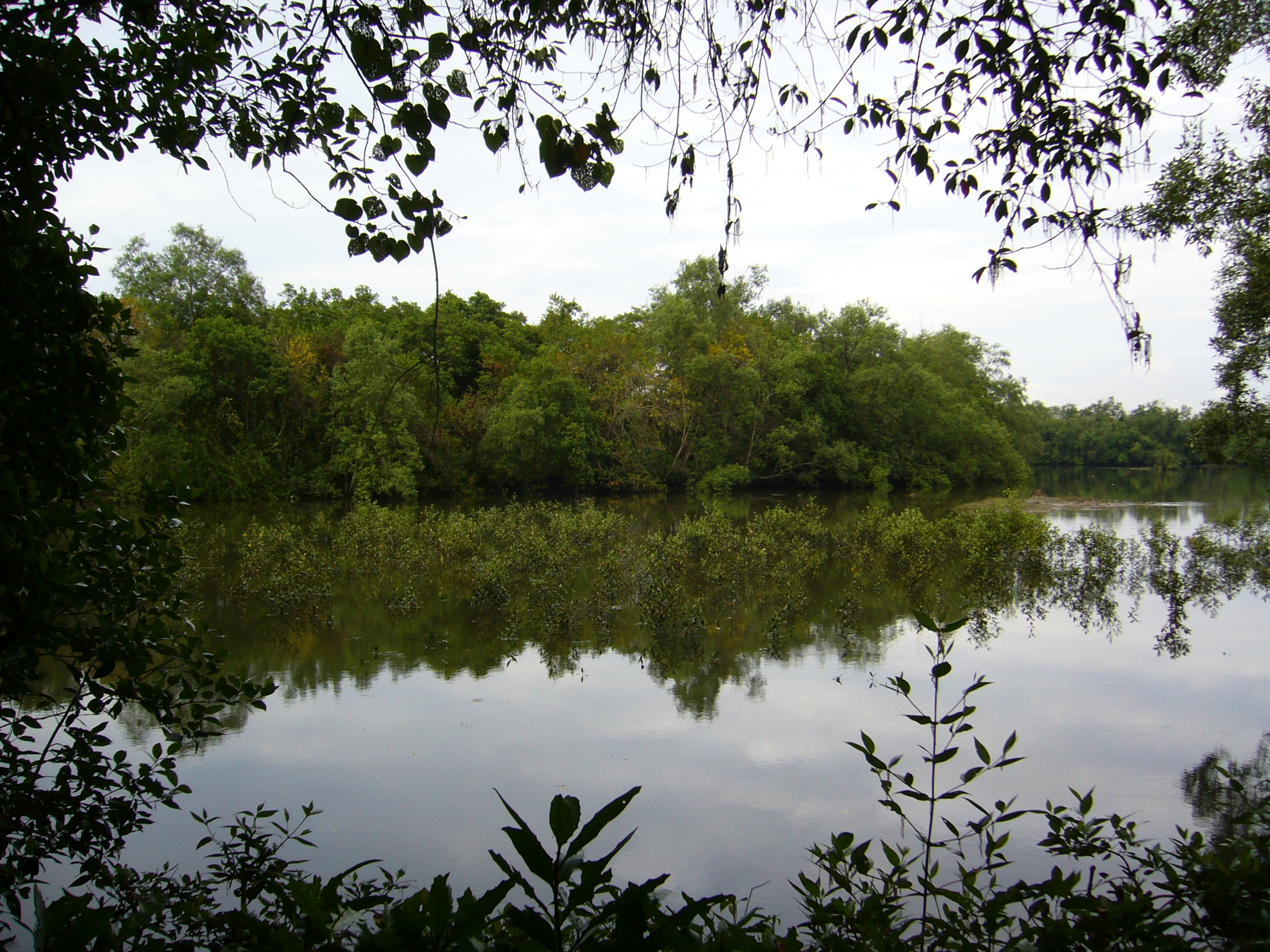 Sungei Buloh Wetland Reserve, Singapore